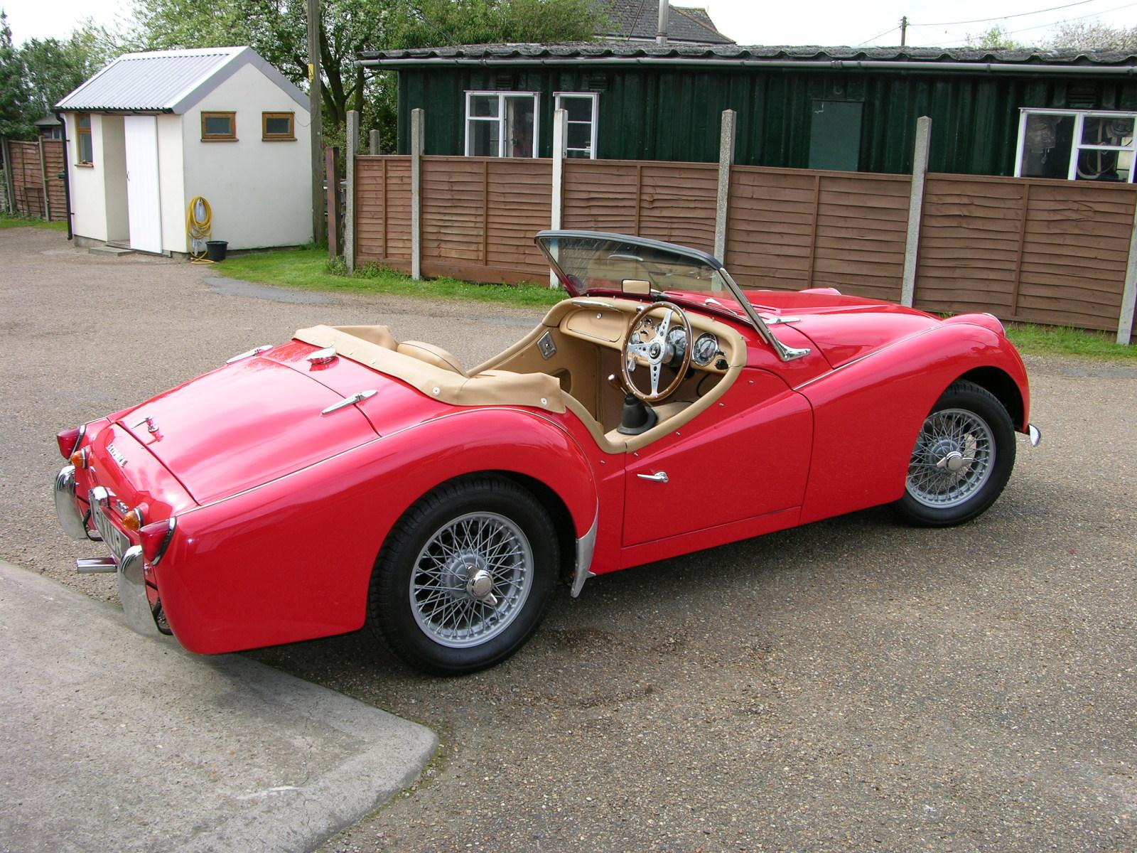 1961 Triumph TR3A